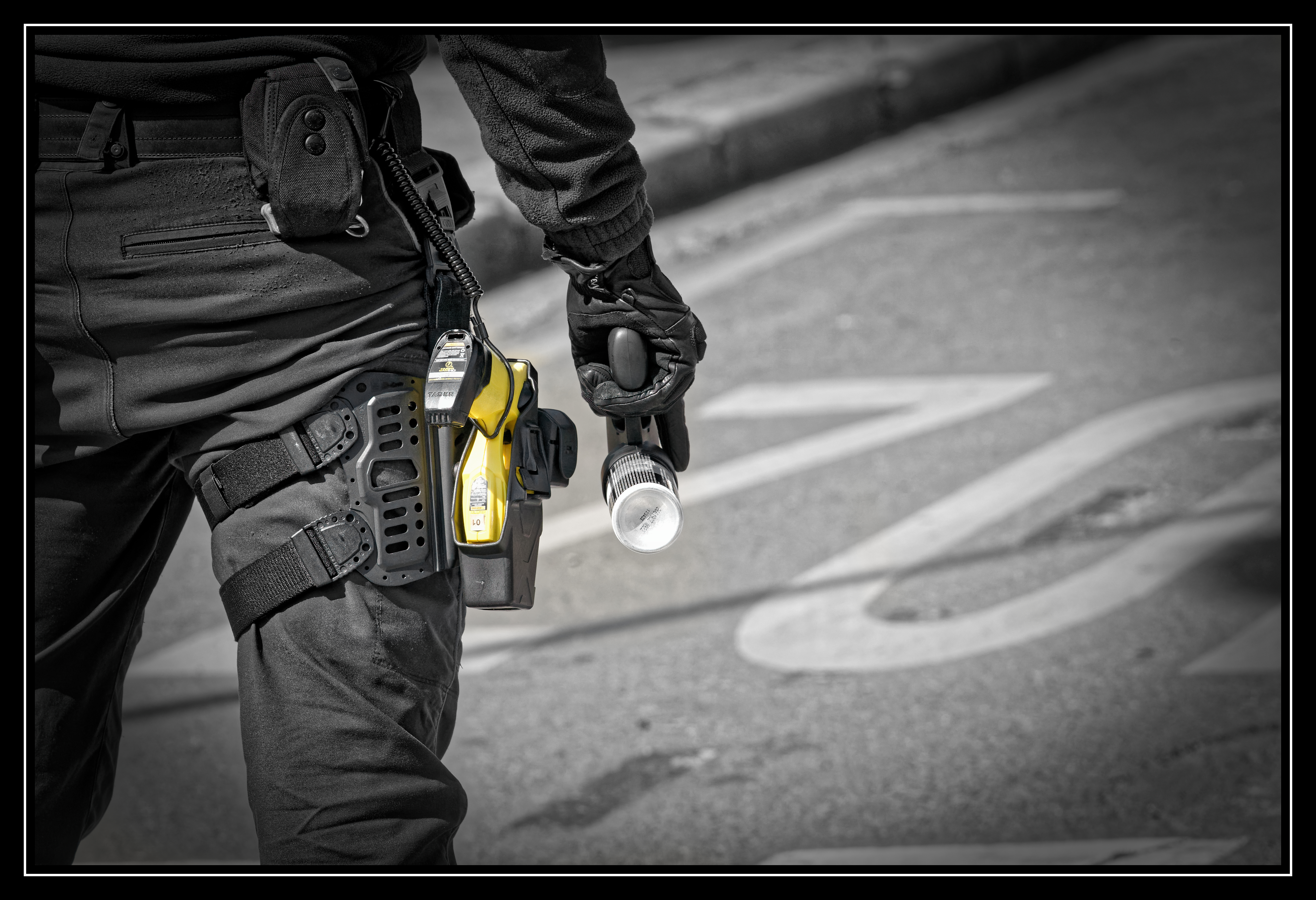 Armement police municipale de Bordeaux